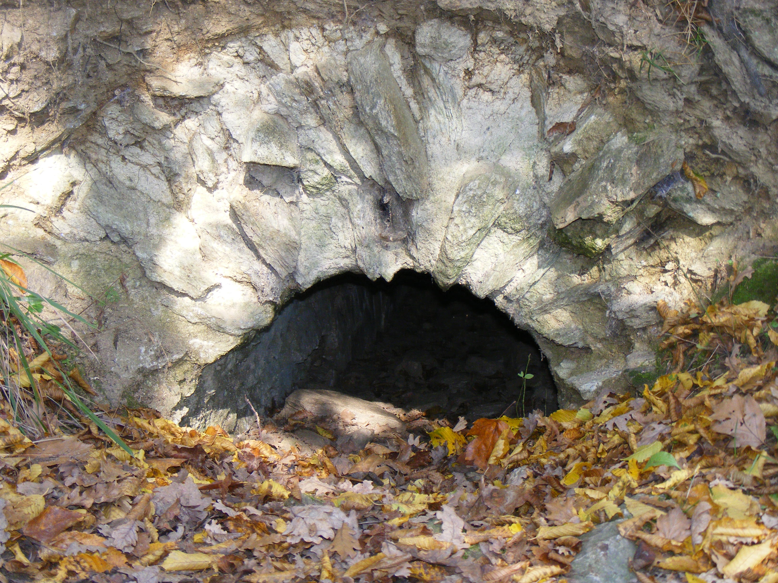 Canalisation souterraine de l' Aqueduc du Gier sur la commune de Saint-Didier-sous-Riverie Auteur verod1